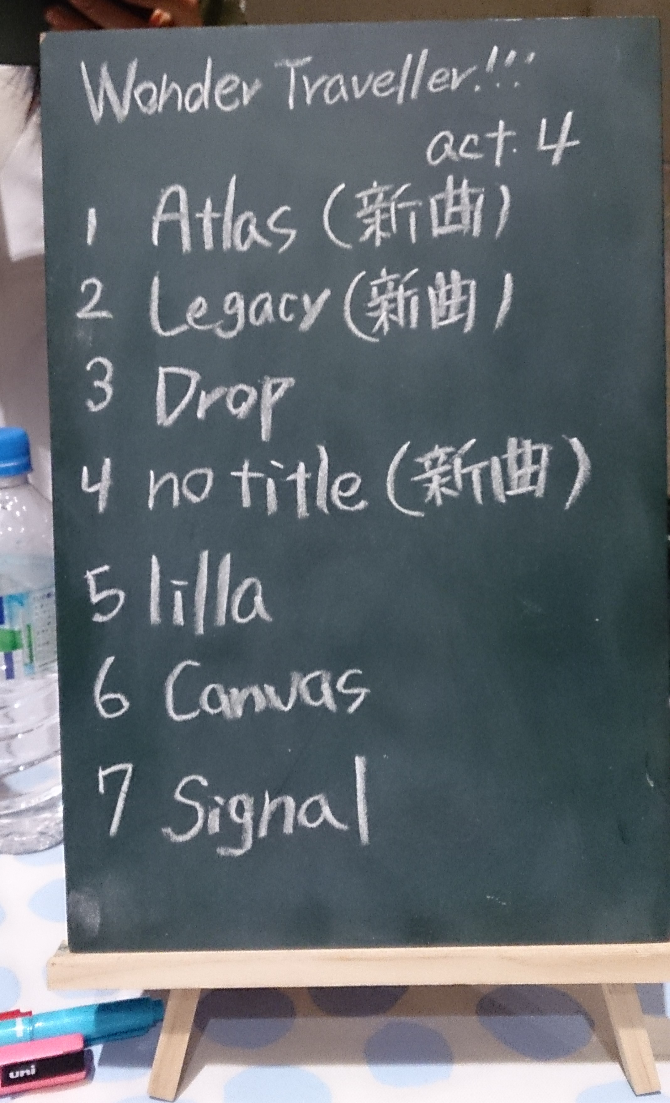 amiinAセトリボード(20160503(1))